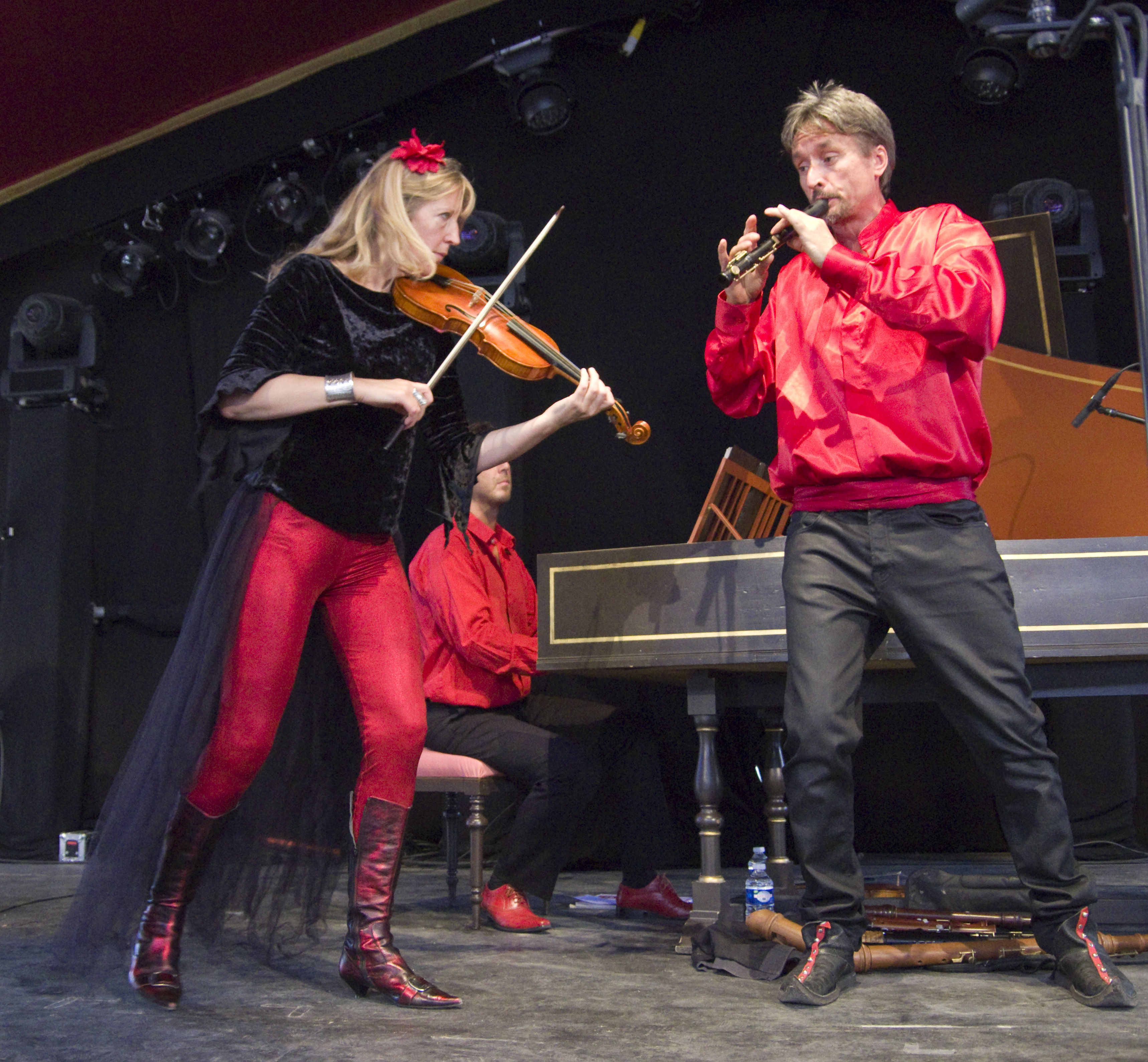 Das Zelt-Musik-Festival 2015 in Freiburg im Breisgau. 19.07.2015 Red Priest